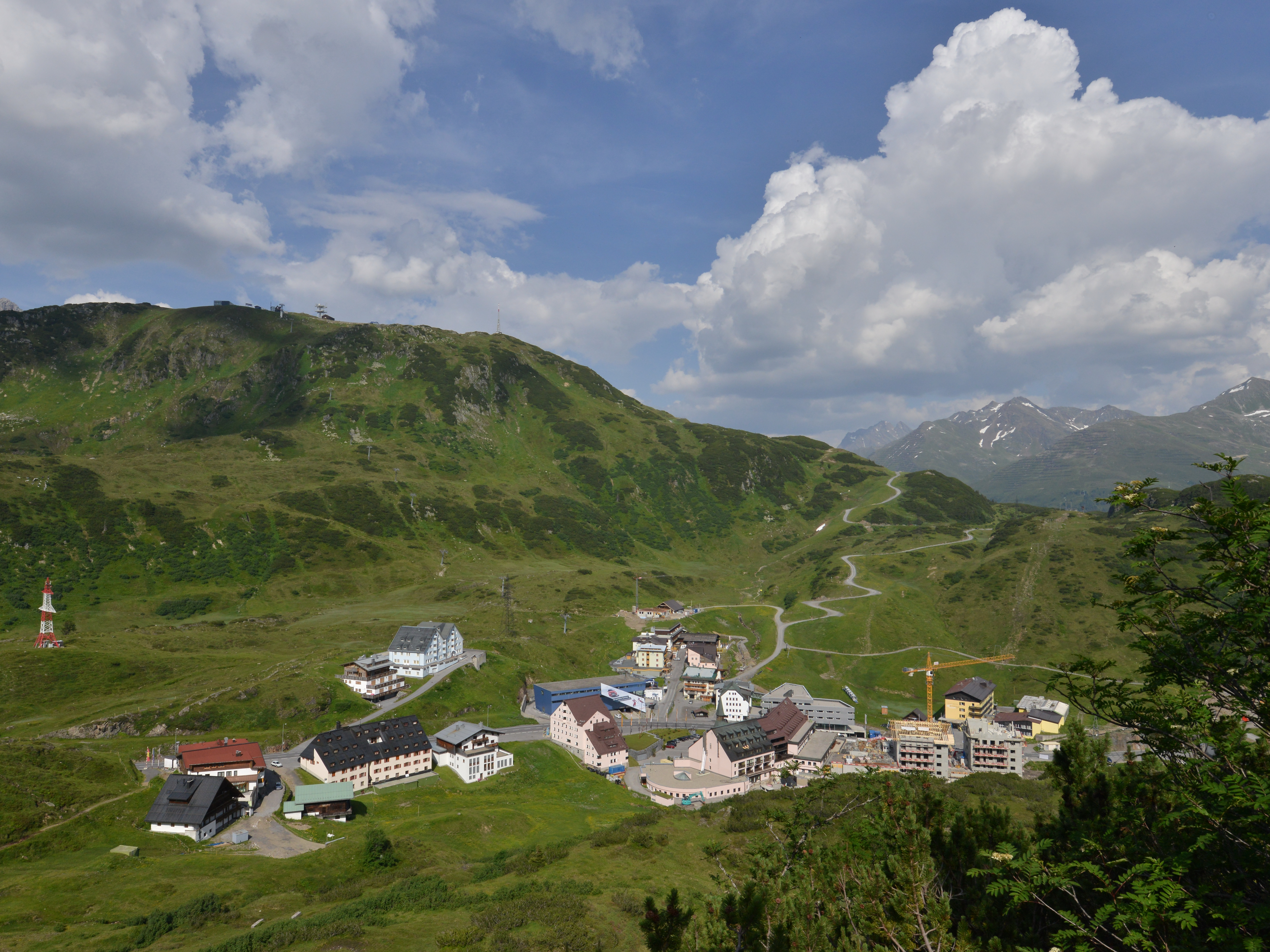 St. Christoph am Arlberg im Sommer 2015.